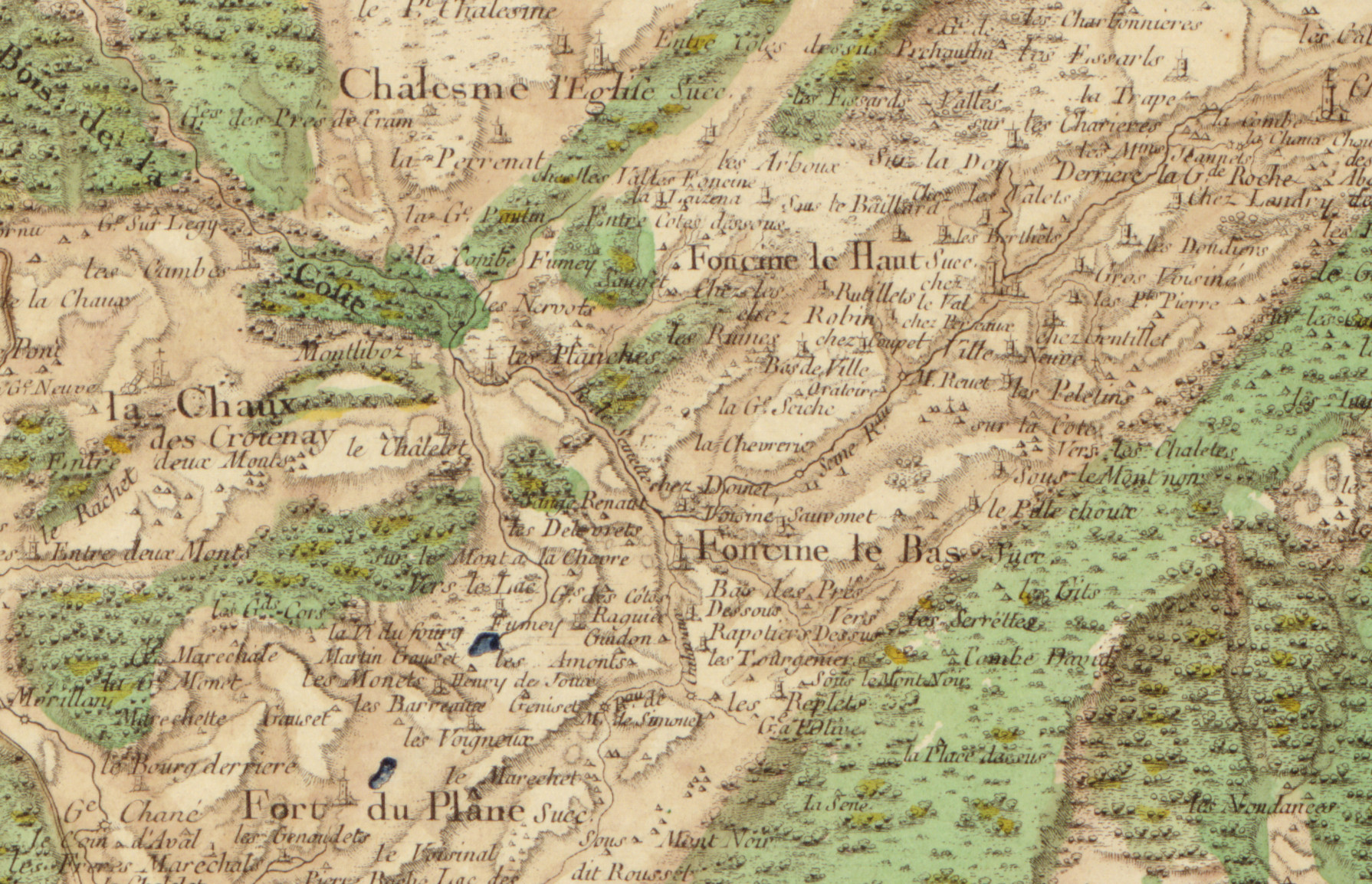 Carte de Cassini n°147 (Nozeroy, zoom sur Foncine), 1759.